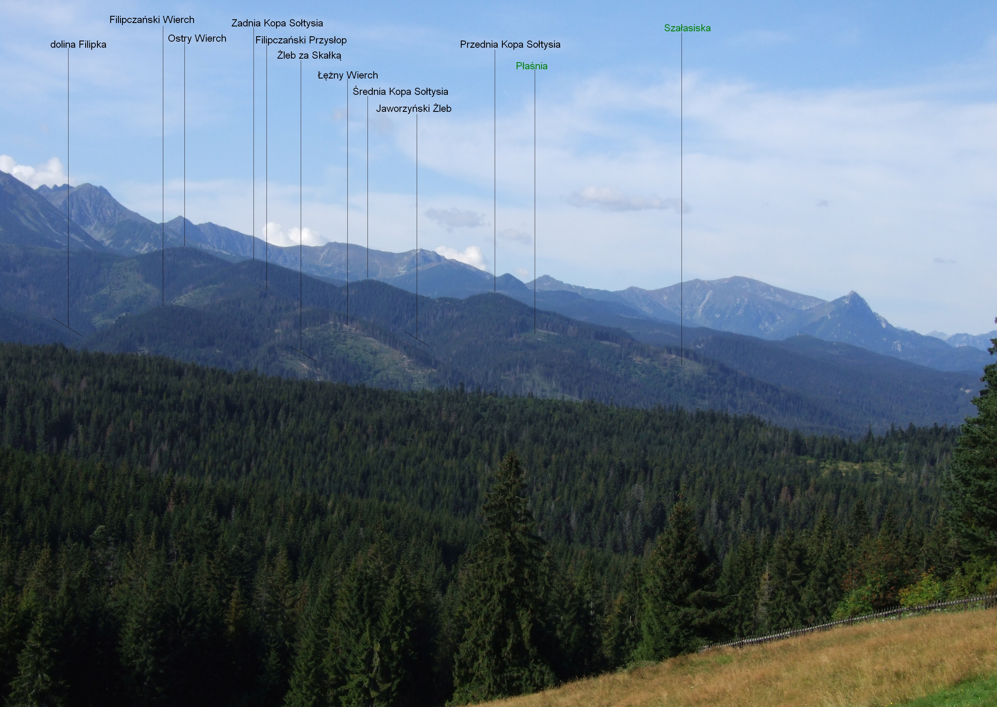 Widok z polany Głodówka